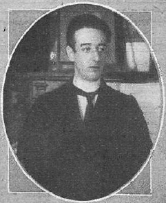 Fotografía del compositor español Óscar Esplá publicada en 1912